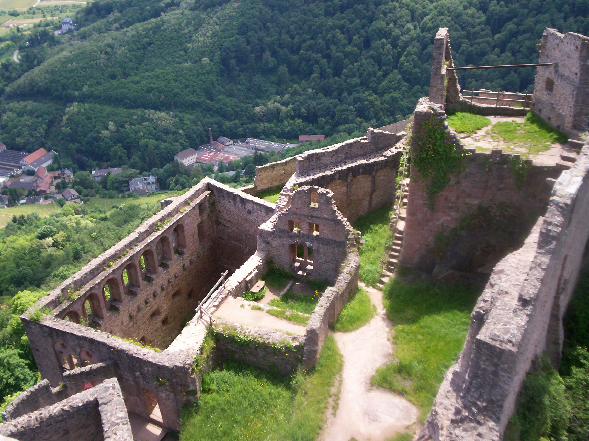 Château de Saint-Ulrich, près de Ribeauvillé, dans le Haut-Rhin : vue générale, du haut du donjon.